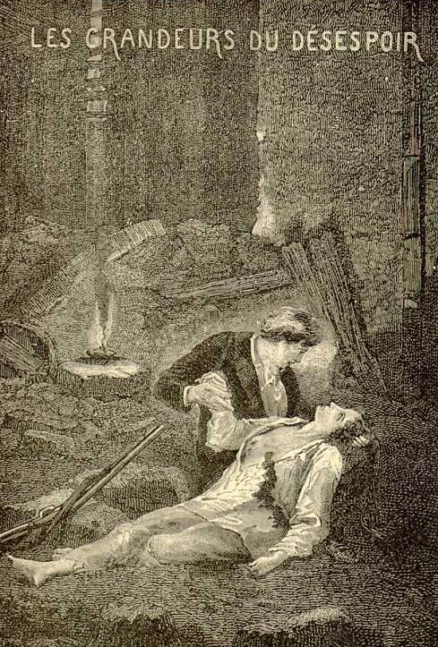 Mort d'Éponine dans les bras de Marius.